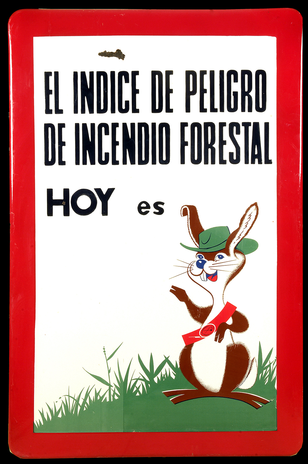 Fotografies dels objectes de l'exposició permanent de la sala "Secà i Muntanya" del Museu Valencià d'Etnologia - Fotografies de Mateo Gamon.